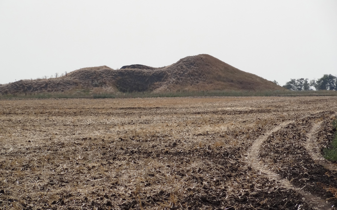 Solokha barrow. V c. BC